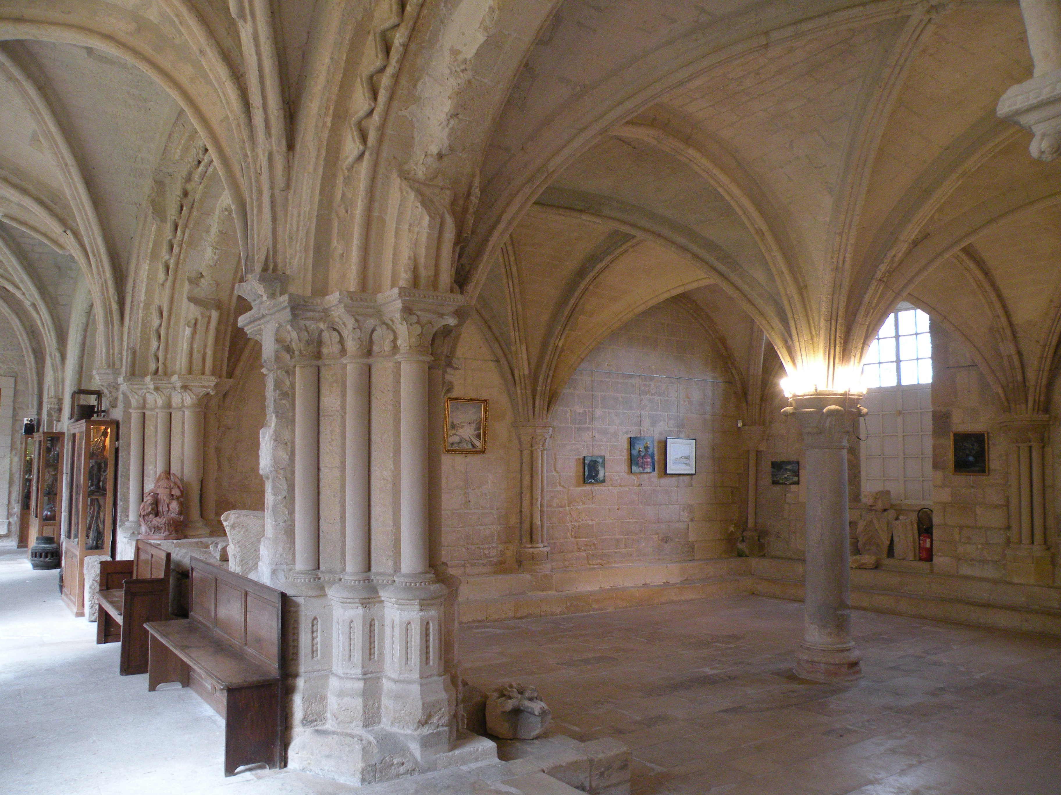 Galerie est du cloître, vue vers le nord ; à droite, vue dans la salle capitulaire.